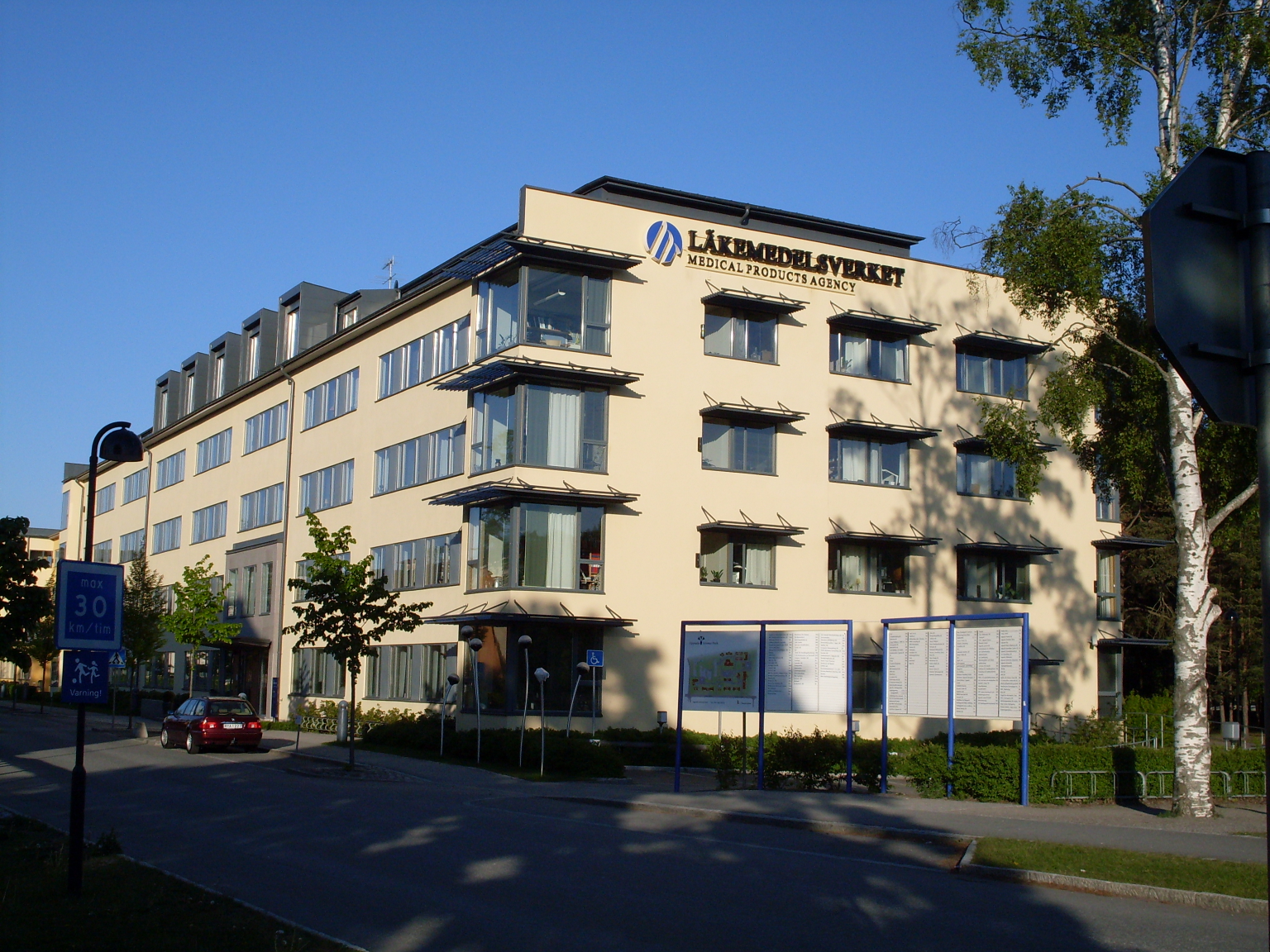 Läkemedelsverket / Swedish Medical Products Agency, Uppsala.